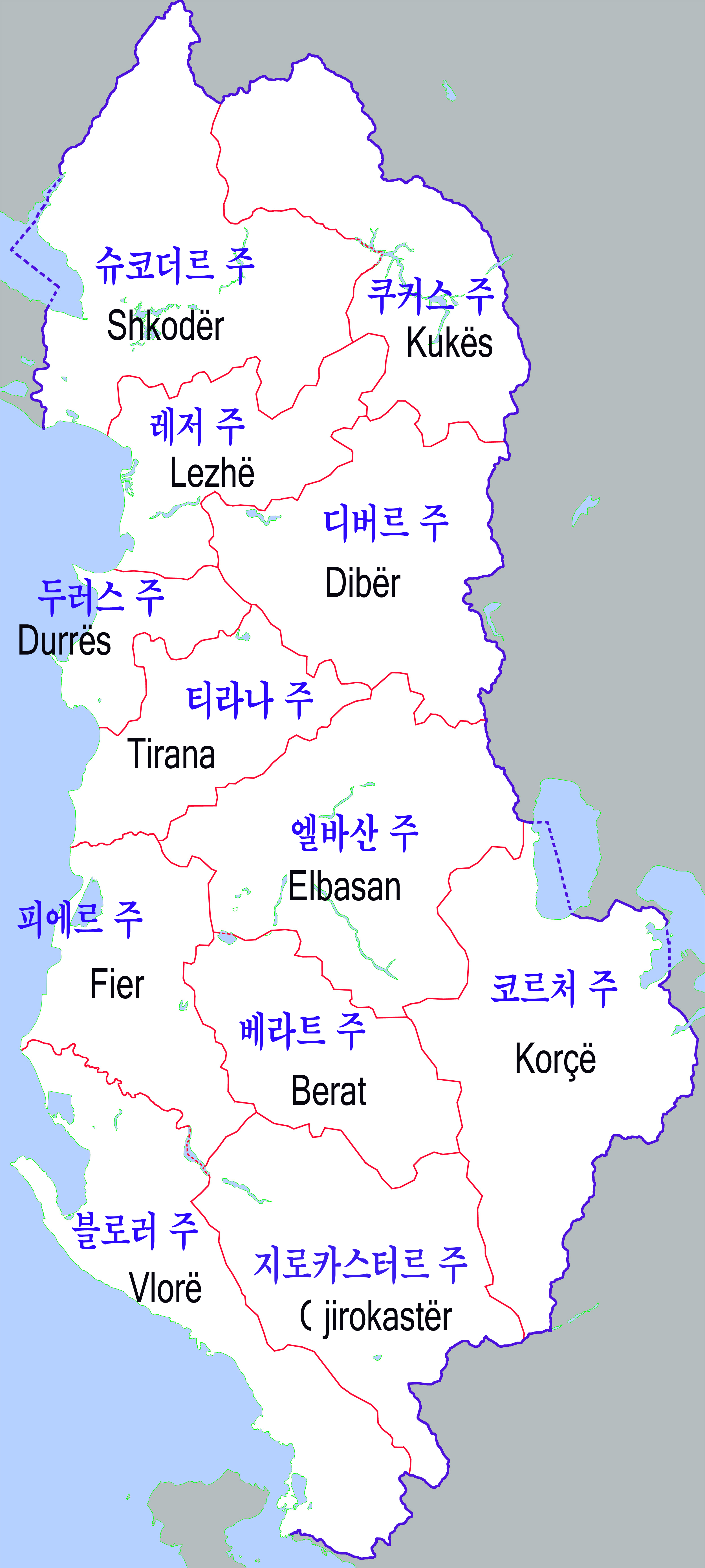 알바니아 행정구역